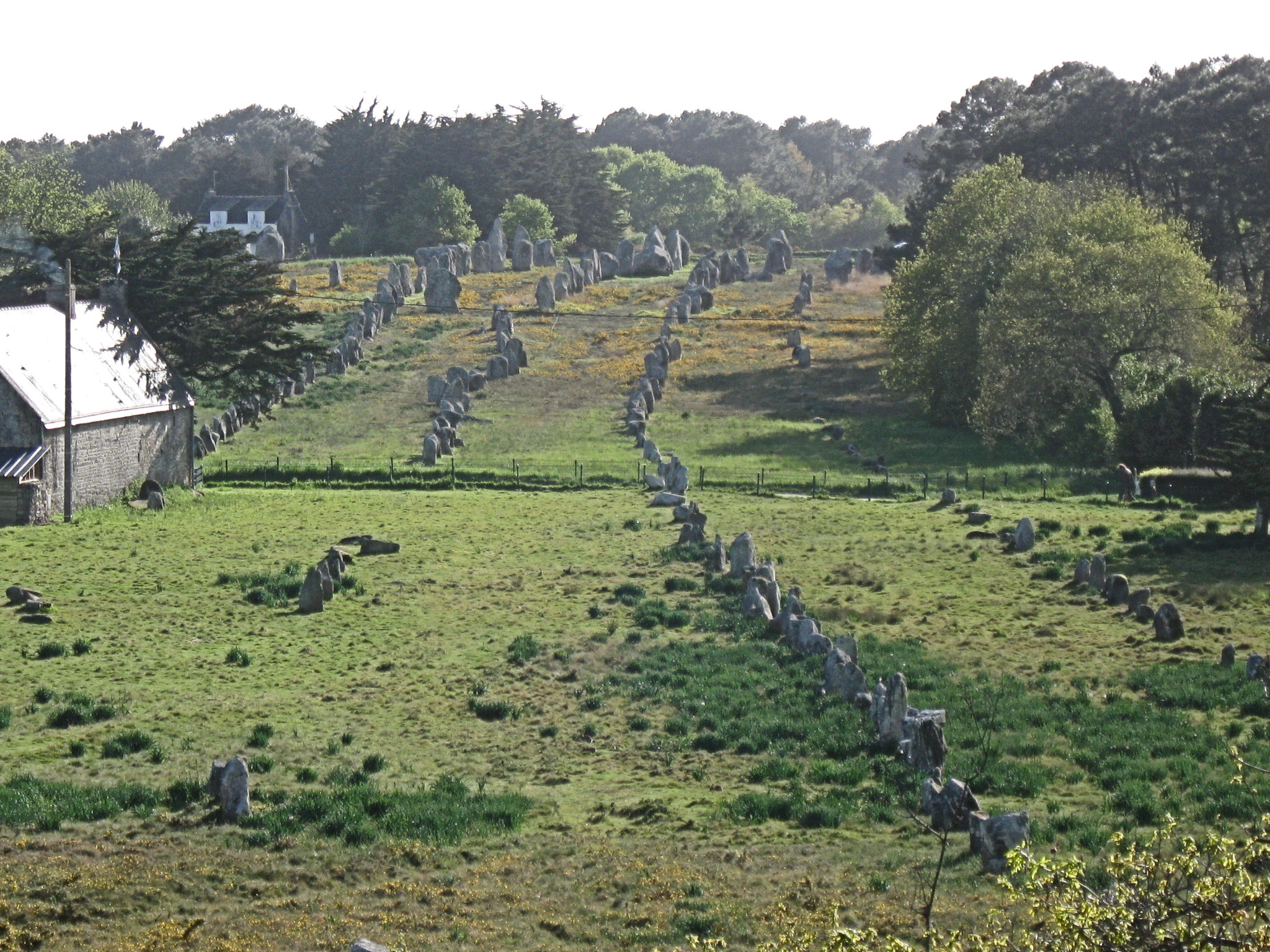 Kermario-Mitte und –West, Carnac (Morbihan), aus Ost